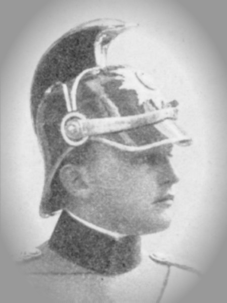 Description